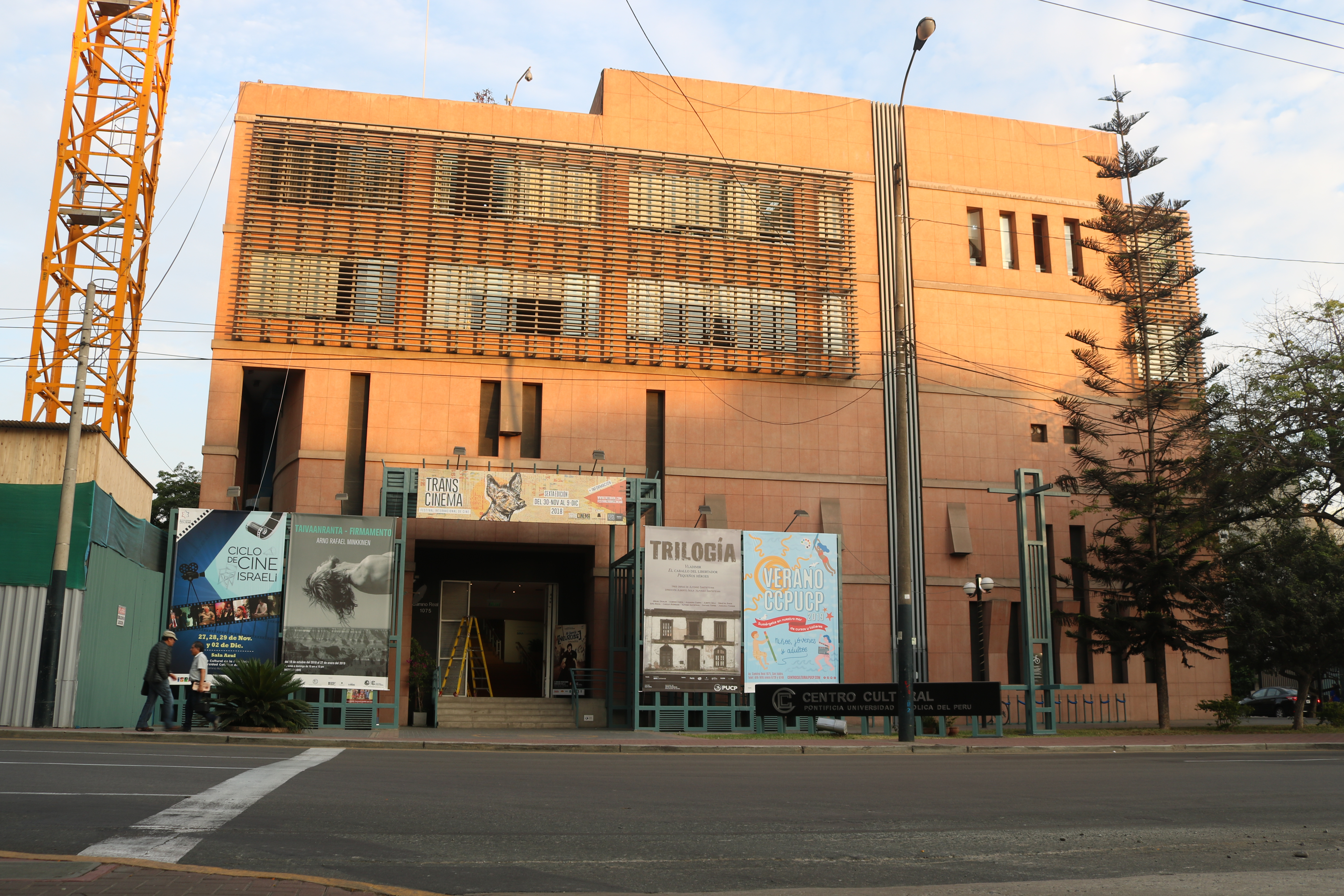 El Centro Cultural de la Pontificia Universidad Católica del Perú (PUCP) en San Isidro, Lima, Perú.